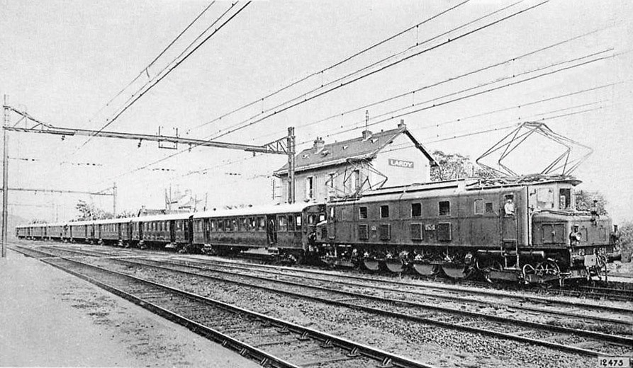 Locomotive à grande vitesse à courant continu de 1.500 V, 4.000 ch, 130 h, de la Compagnie des chemins de Fer Paris-Orléans